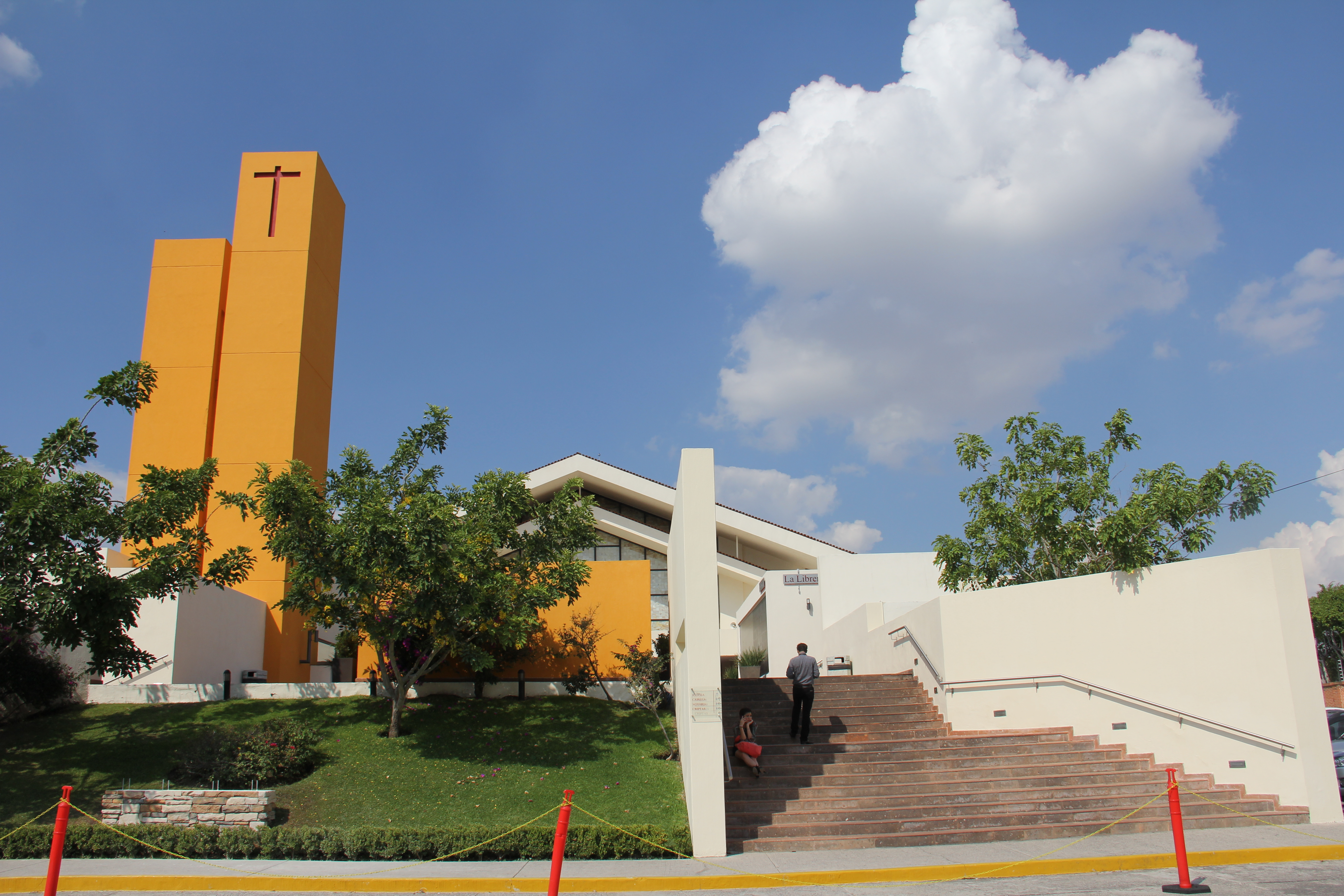 Exterior de la Iglesia Josemaria Escriva en Guadalajara, Mexico.